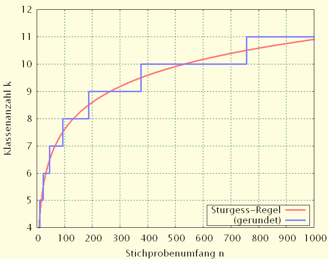 Sturgess-Regel